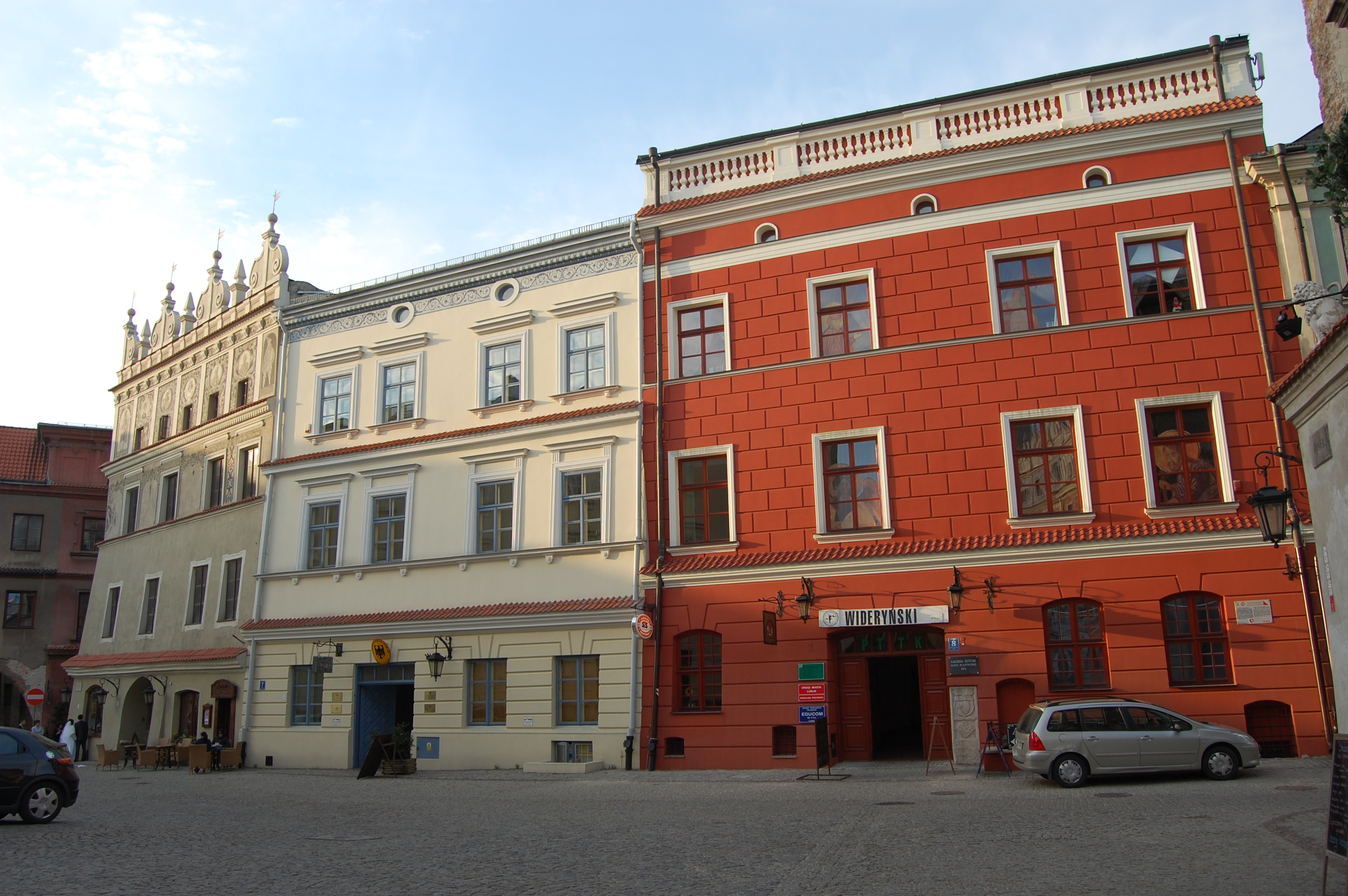 Kamienice na rynku Starego Miasta w Lublinie.